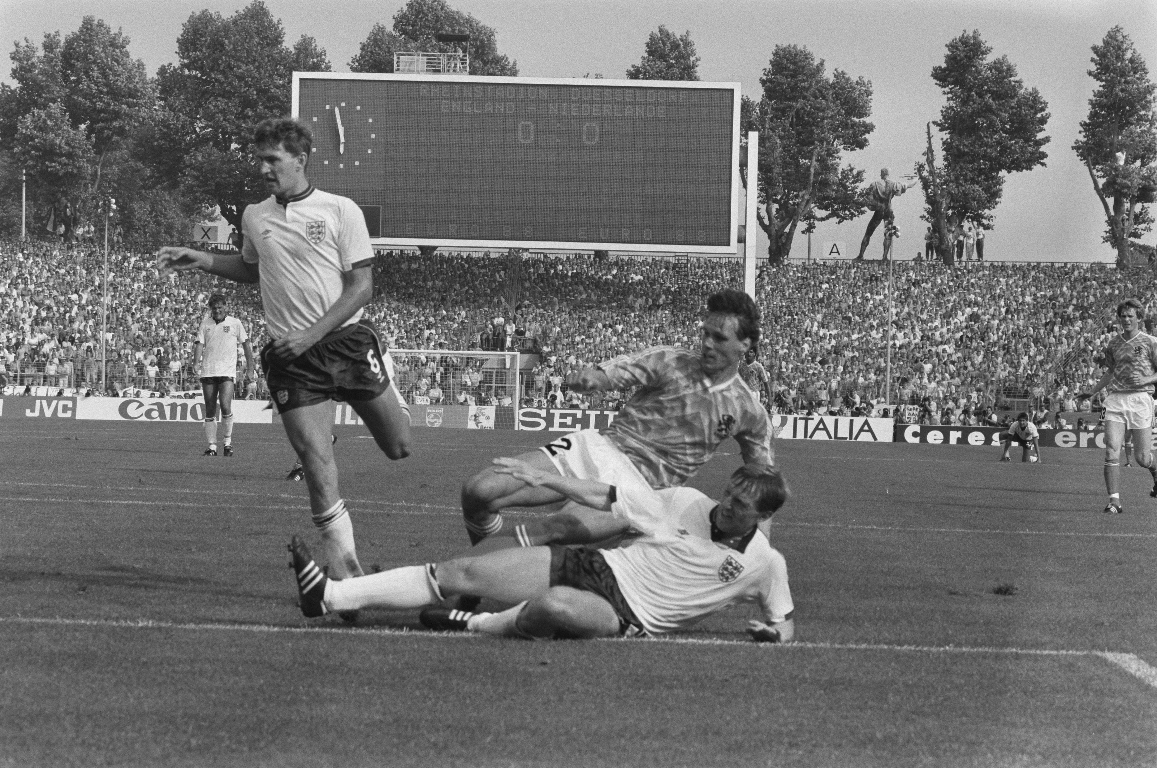 Collectie / Archief : Fotocollectie Anefo Reportage / Serie : [ onbekend ] Beschrijving : EK voetbal in West Duitsland ; Engeland tegen Nederland 1-3 Datum : 14 juni 1988 Locatie : Duitsland, Groot-Brittannië, Nederland Trefwoorden : sport, voetbal Fotograaf : Bogaerts, Rob / Anefo Auteursrechthebbende : Nationaal Archief Materiaalsoort : Negatief (zwart/wit) Nummer archiefinventaris : bekijk toegang 2.24.01.05 Bestanddeelnummer : 934-2662